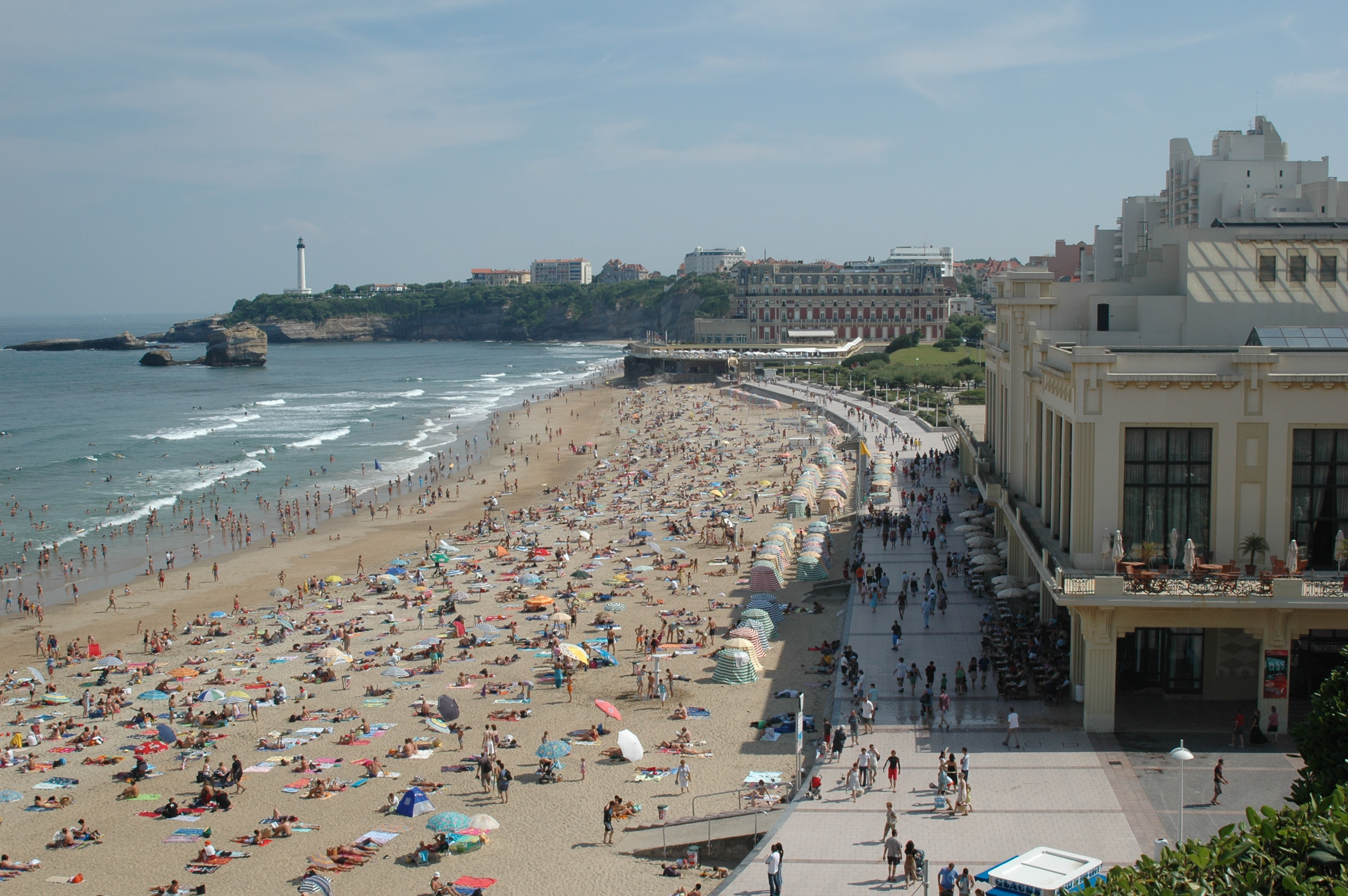 Biarritz, la grande plage. Photo prise le 06/08/06 par Harrieta171